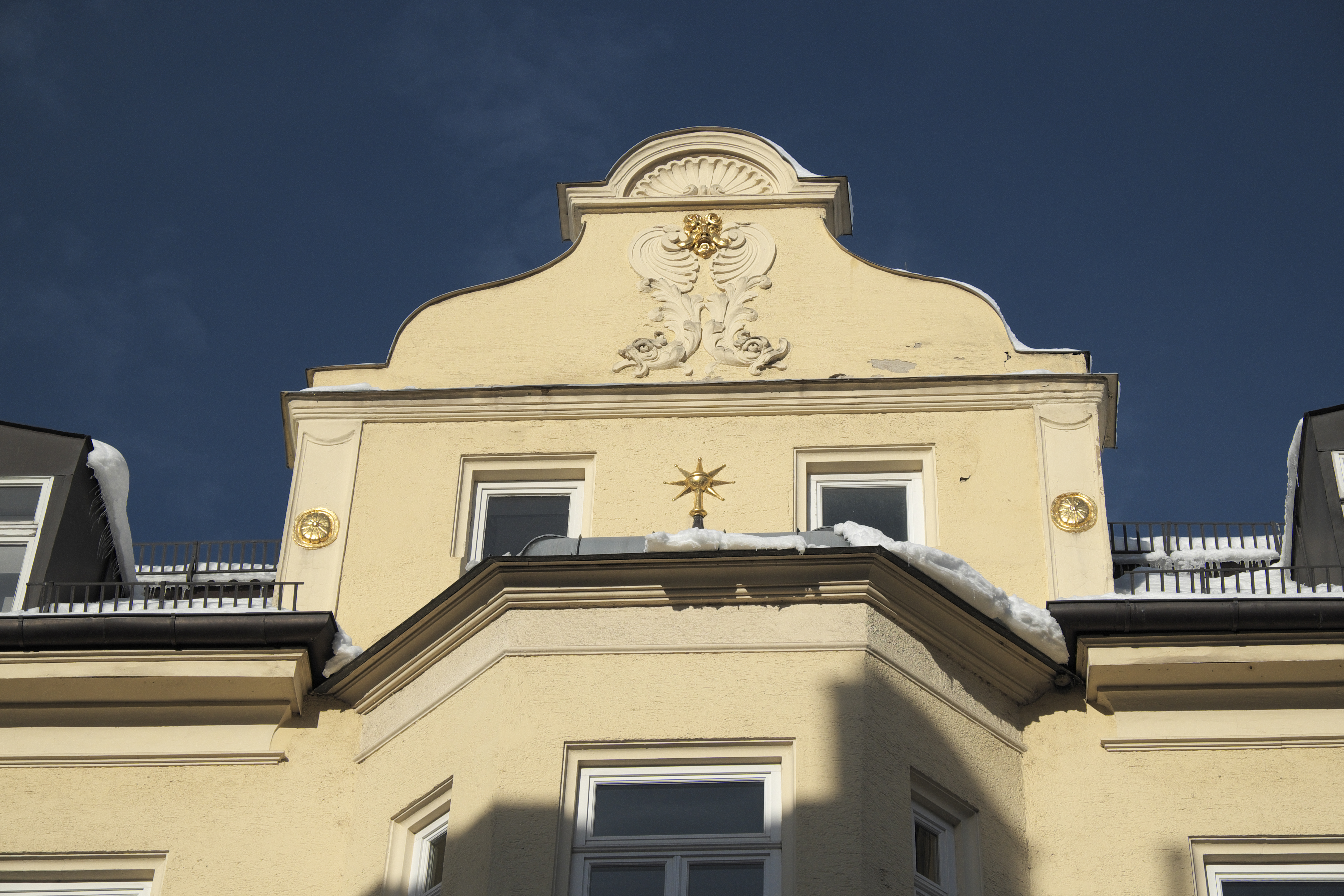 Mietshaus in der Metzstraße 35 in Haidhausen im Stadtbezirk Au-Haidhausen in München (Bayern/Deutschland), um 1900, Stuckrelief am Giebel, Darstellung: Delphine